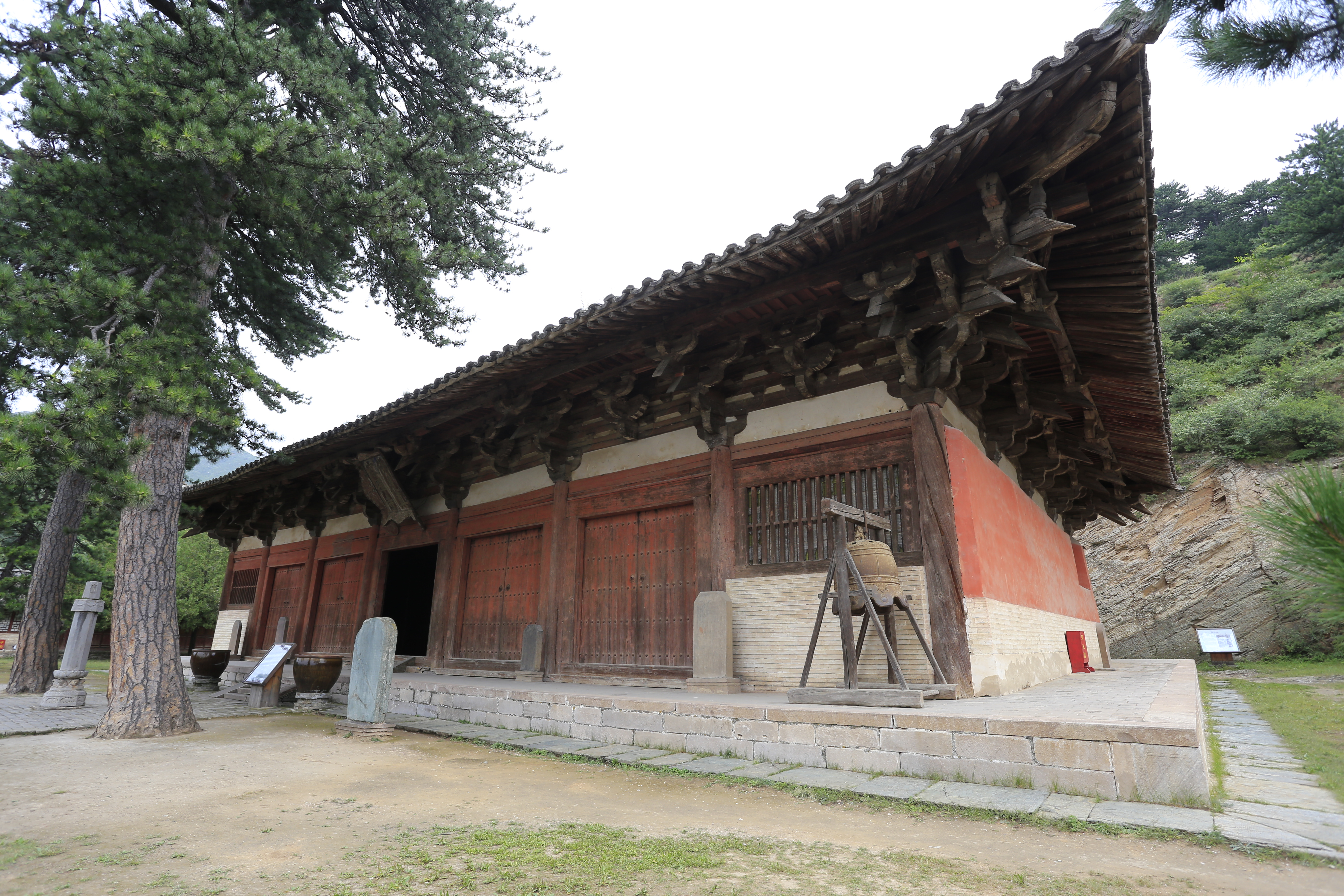 五台佛光寺—— 大殿西南角